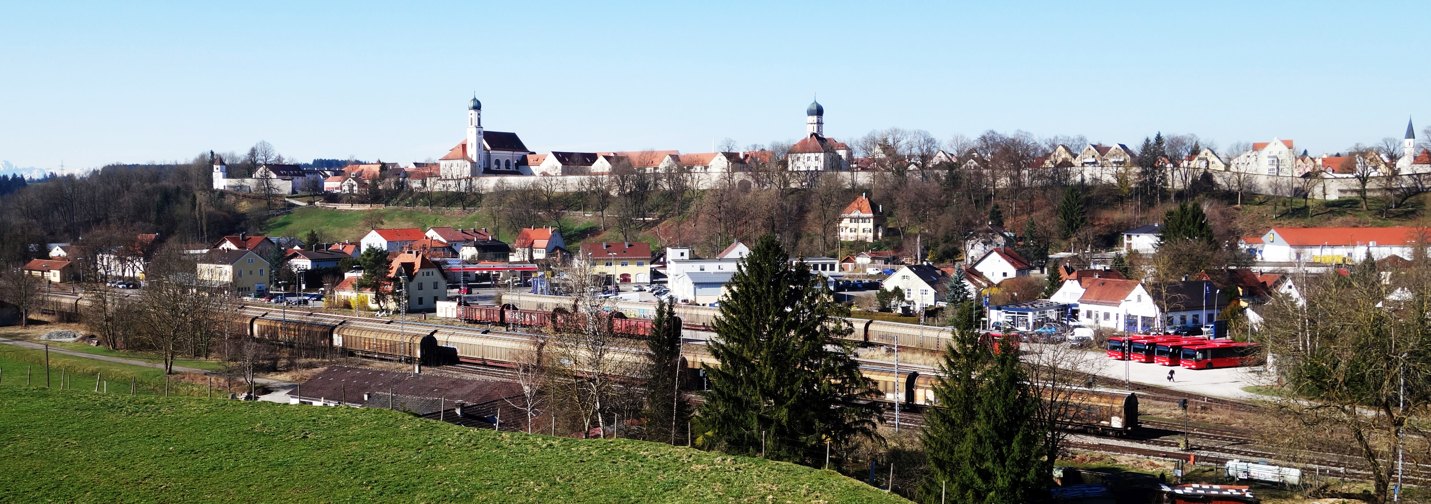 Schongauer Altstadt von Osten gesehen